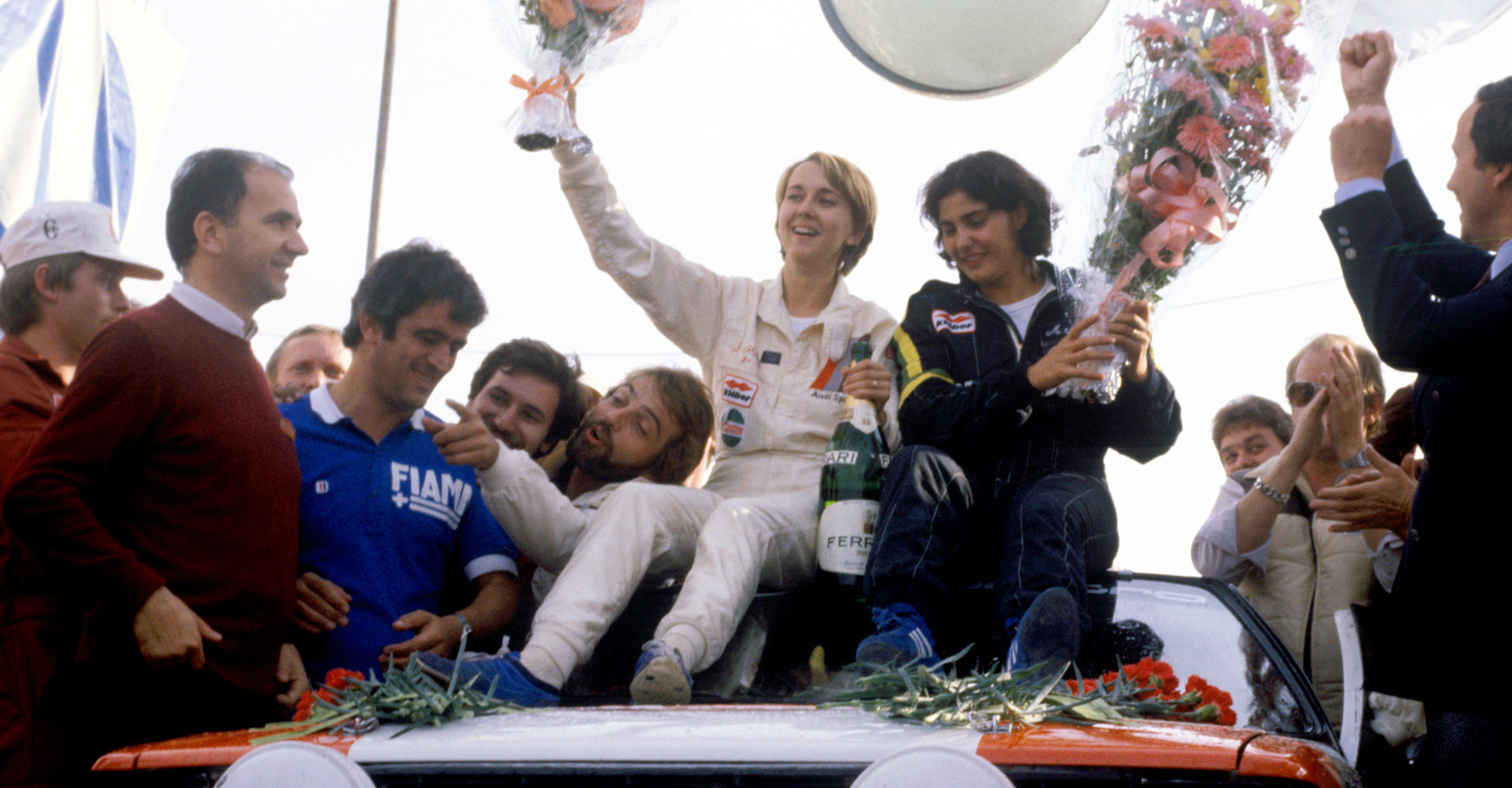 Sanremo, 10 ottobre 1981. La pilota francese Michèle Mouton (a destra) e la sua navigatrice italiana Fabrizia Pons (a sinistra) festeggiano la loro vittoria su Audi quattro al Rally di Sanremo, valevole come Rally d'Italia nell'ambito del campionato del mondo rally 1981: si trattò del primo successo, nella storia del mondiale rally, ottenuto da un equipaggio femminile.